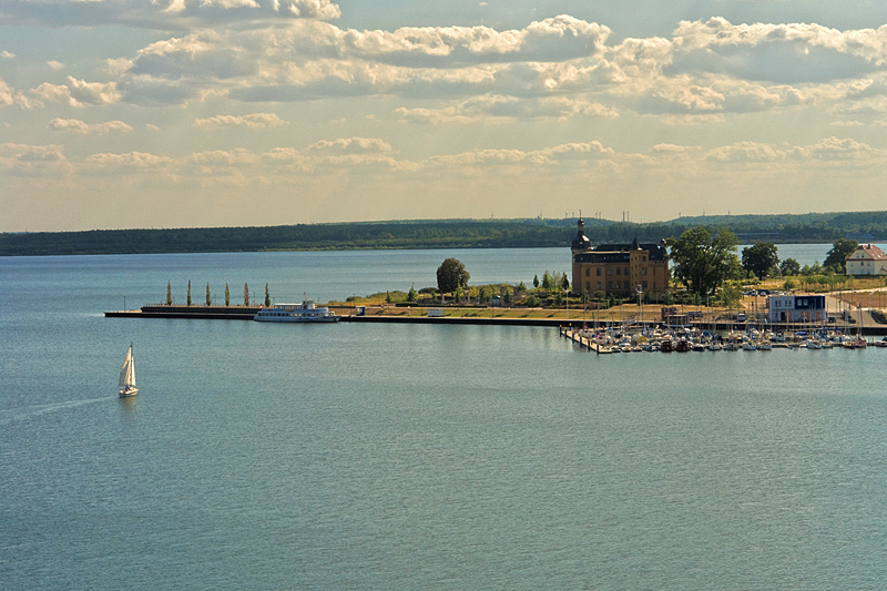 Bernsteinvilla und Bernsteinsee in der Gemeinde Bitterfeld-Wolfen